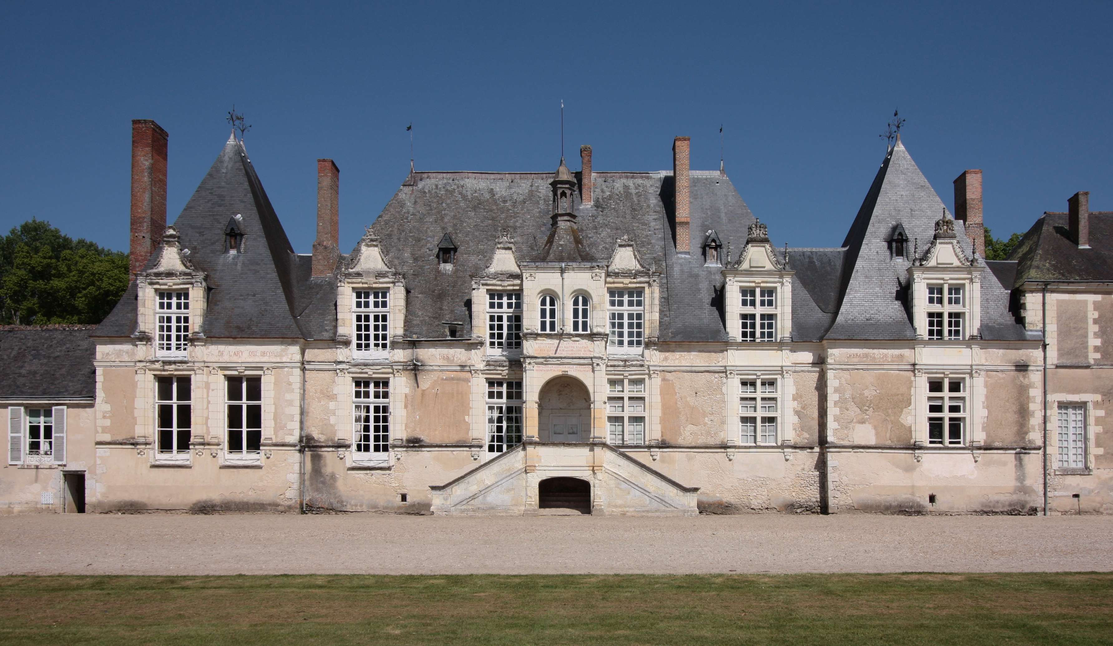 Schloss Villesavin, Département Loir-et-Cher/Frankreich - Parkfront